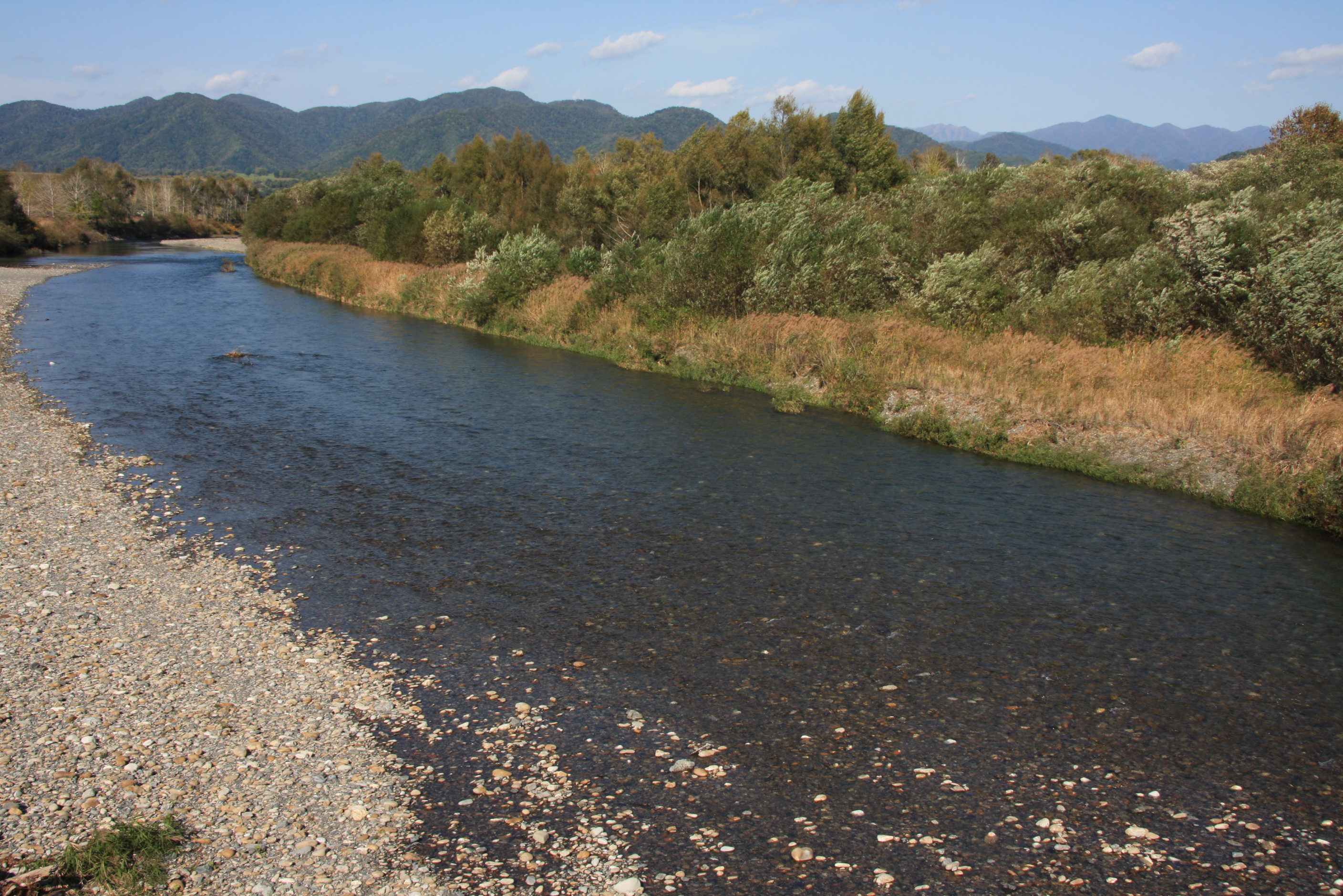 日高幌別川 西舎橋より上流